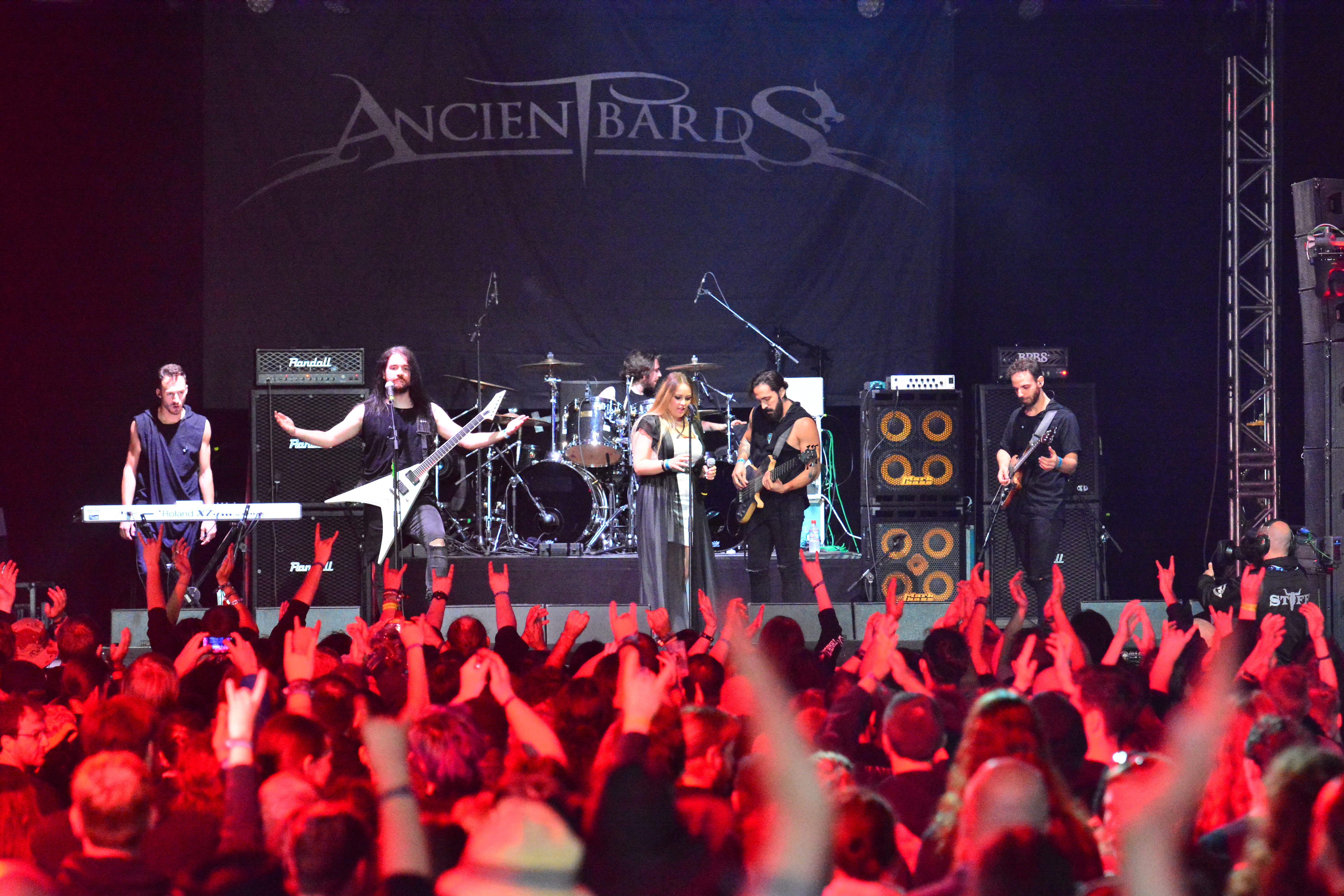 Ancient Bards beim Wacken Open Air 2015